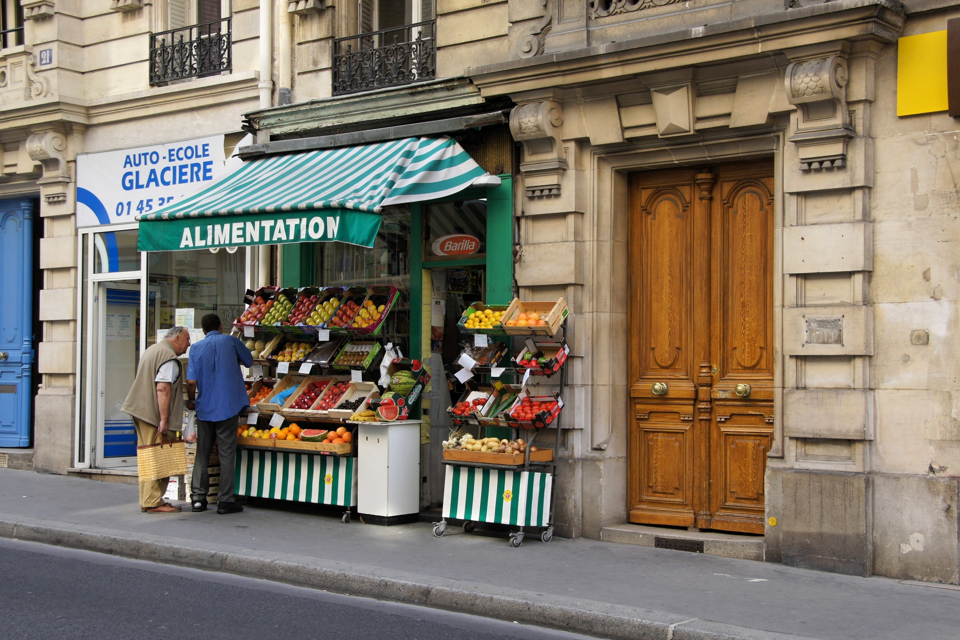 Fruits et légumes à Paris